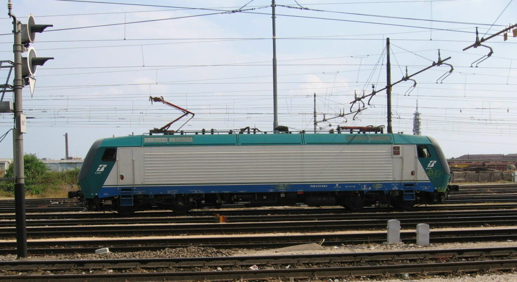 Un locomotore E.412 alla stazione di Verona Porta Nuova